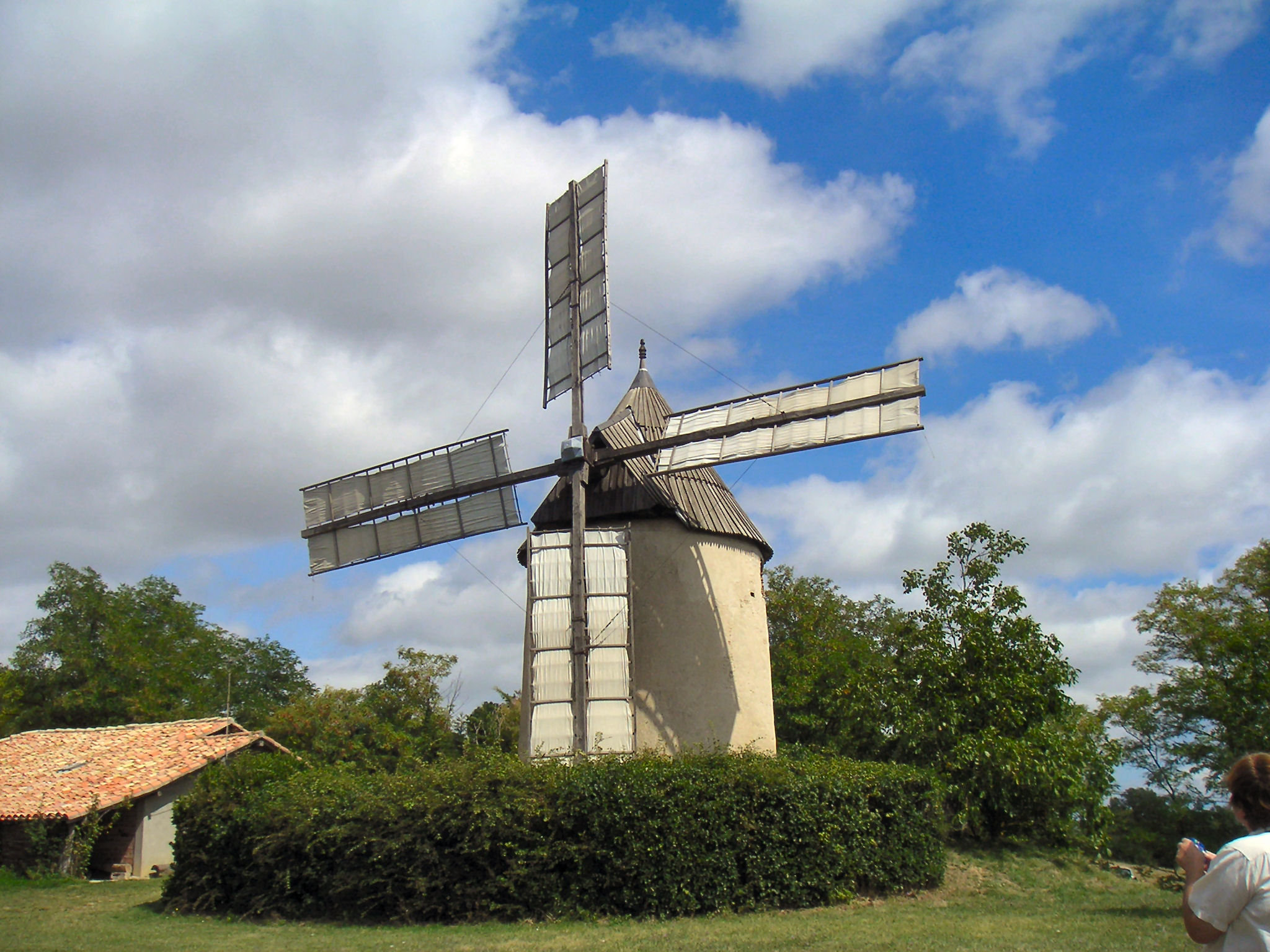 Photographie du moulin de Brignemont (Haute Garonne, France)